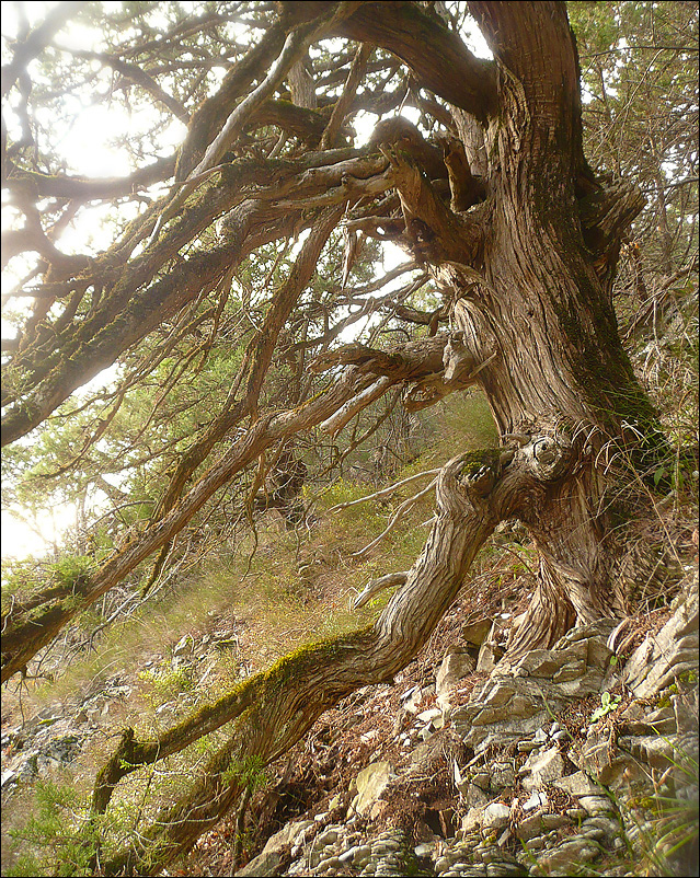 Старое дерево можжевельник высокого. Окрестности Новороссийска